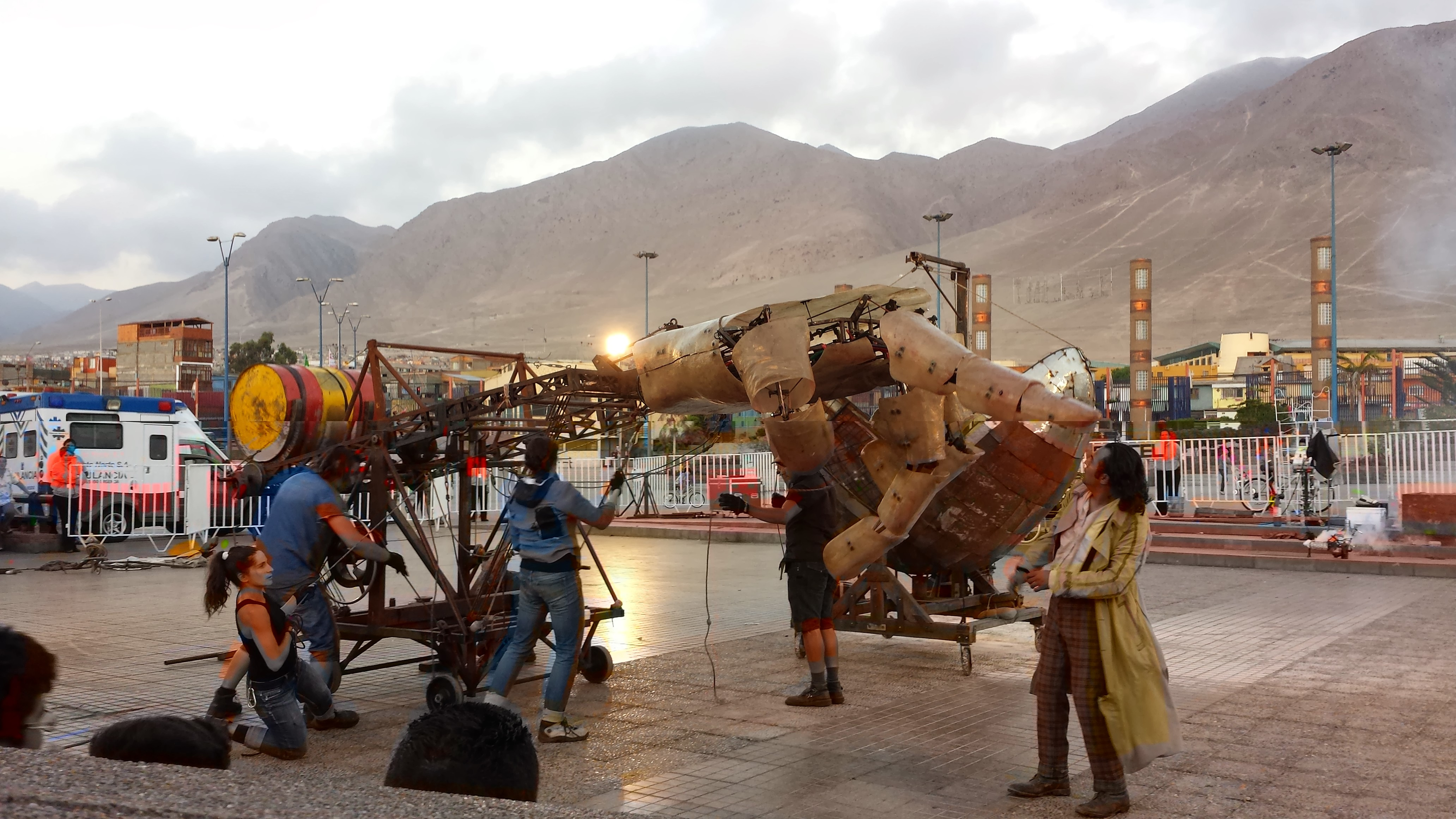 Obra de teatro callejero de la compañía chilena la Gran Reyneta.